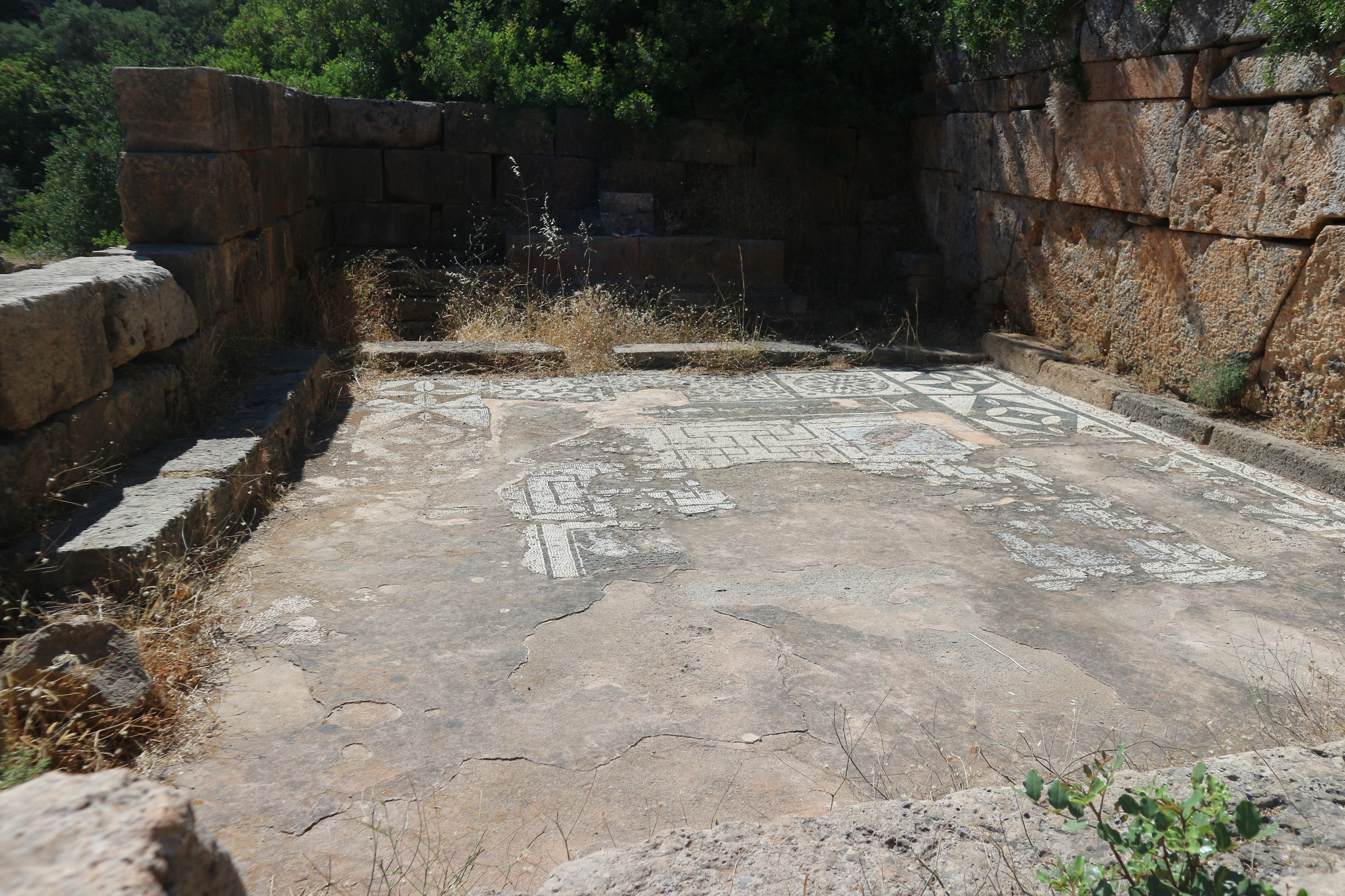 Tempel des Asklepios mit Mosaik